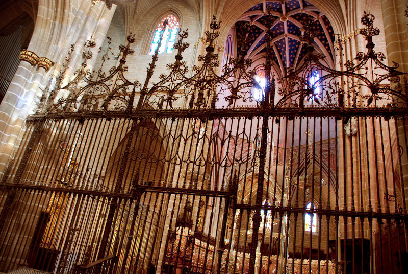 reja gotica pamplona